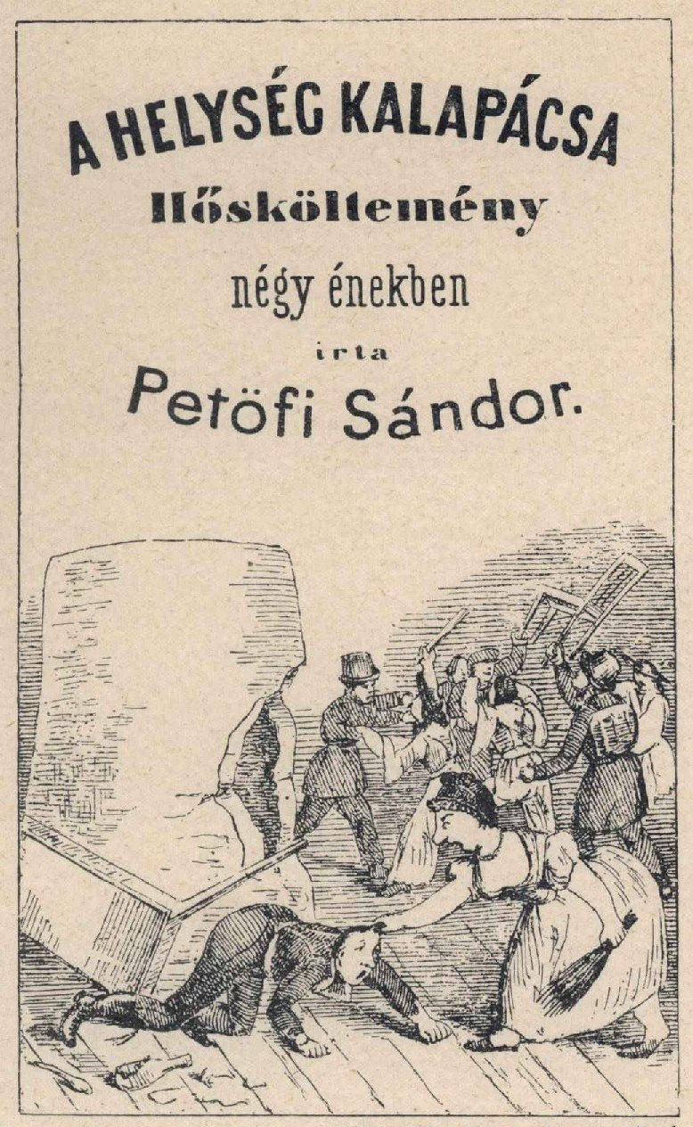 Petőfi Sándor: A helység kalapácsa című könyvének korabeli kiadása